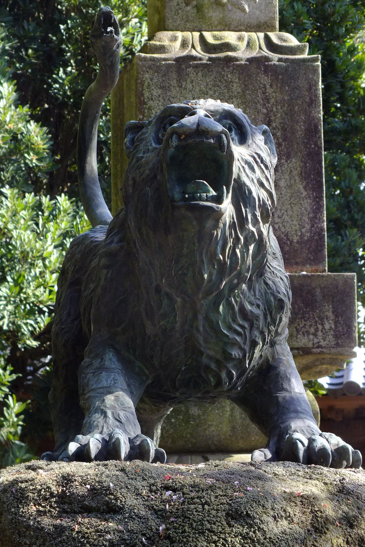 Chomeiji temple-Nishiwaki,Hyogo 長明寺（西脇市）源頼政鵺退治